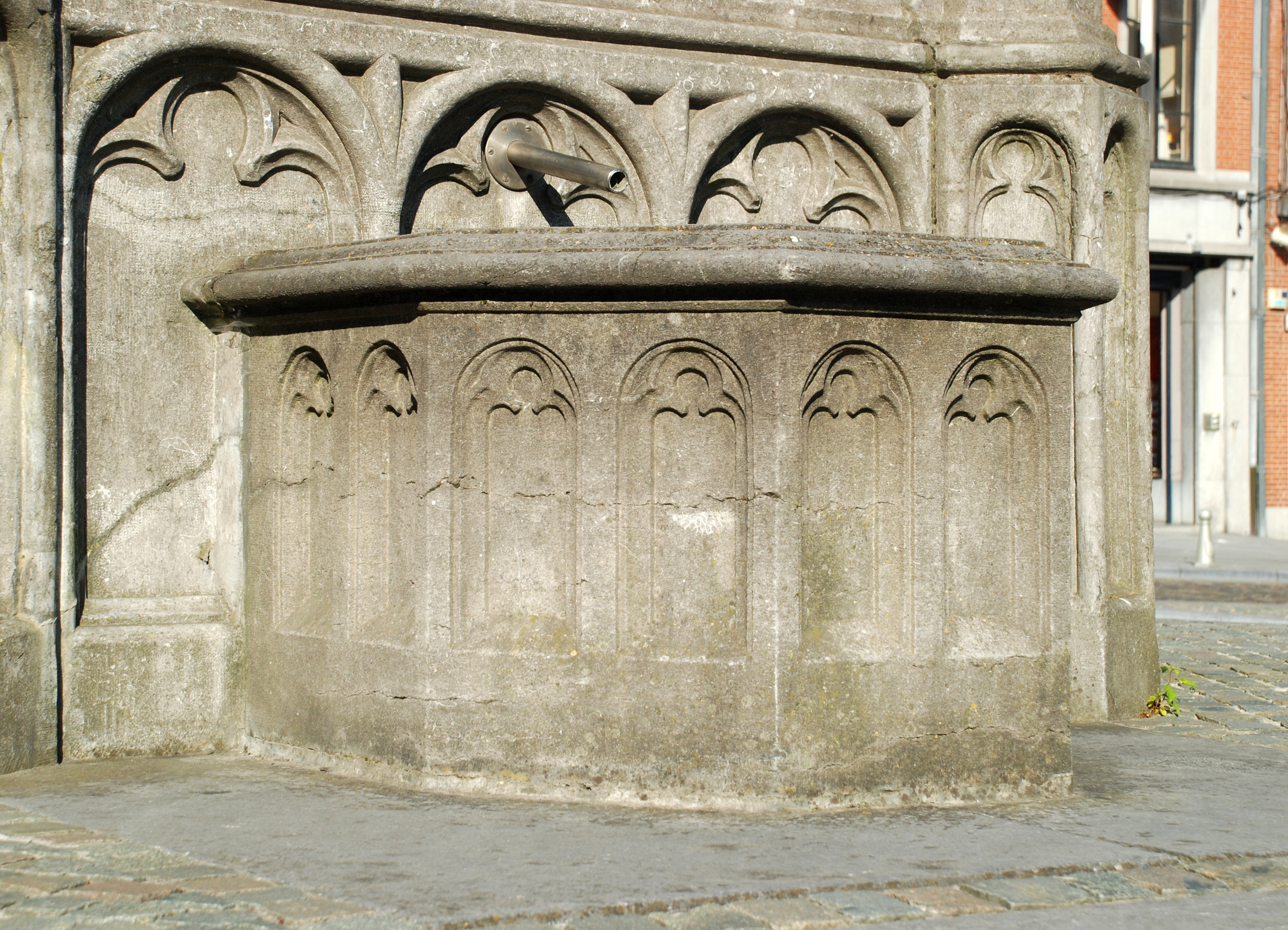 Belgique - Brabant wallon - Fontaine-perron de Nivelles